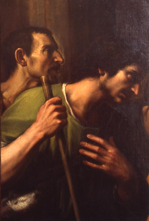 Due pastori